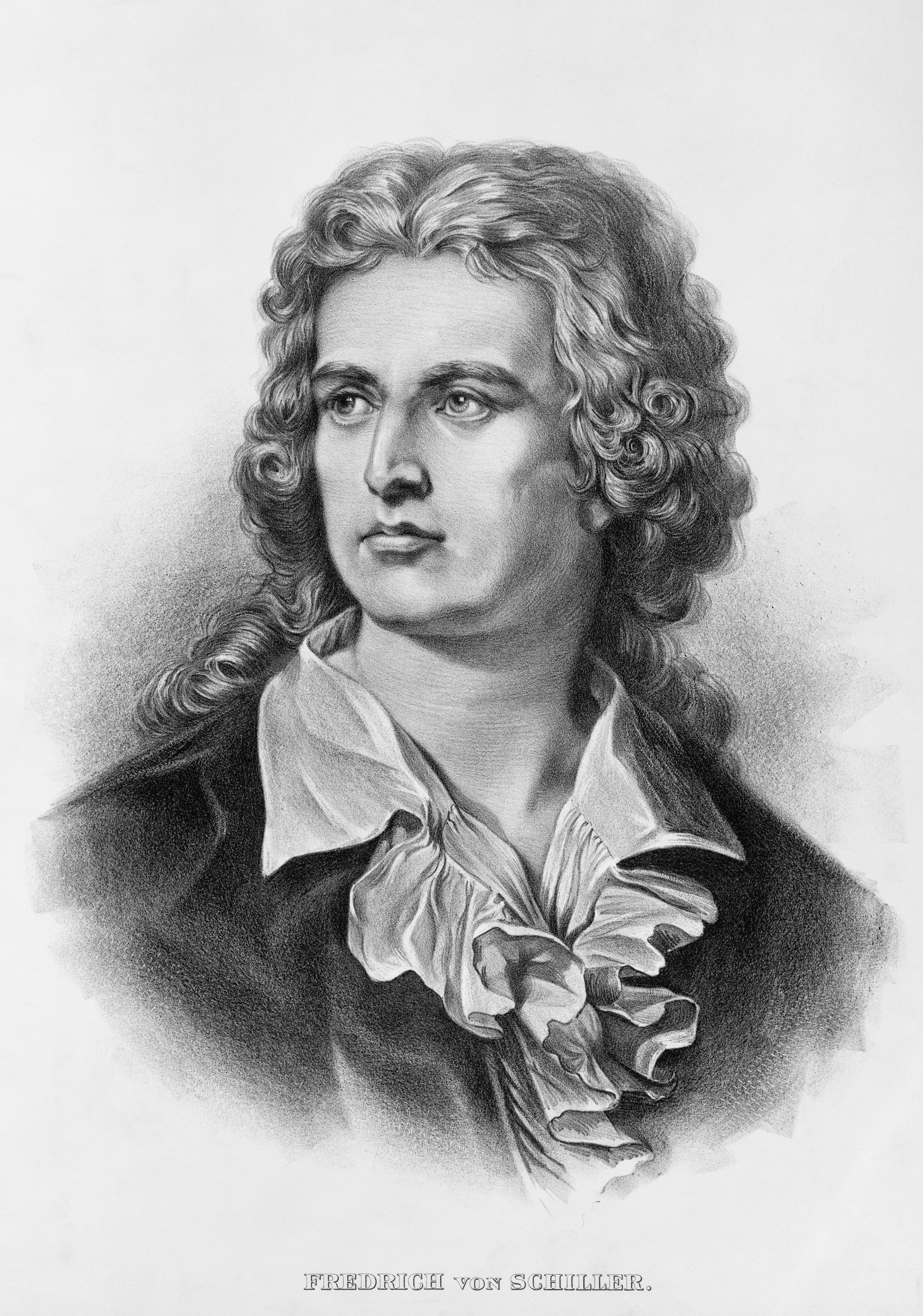 "Fredrich von Schiller", lithograph